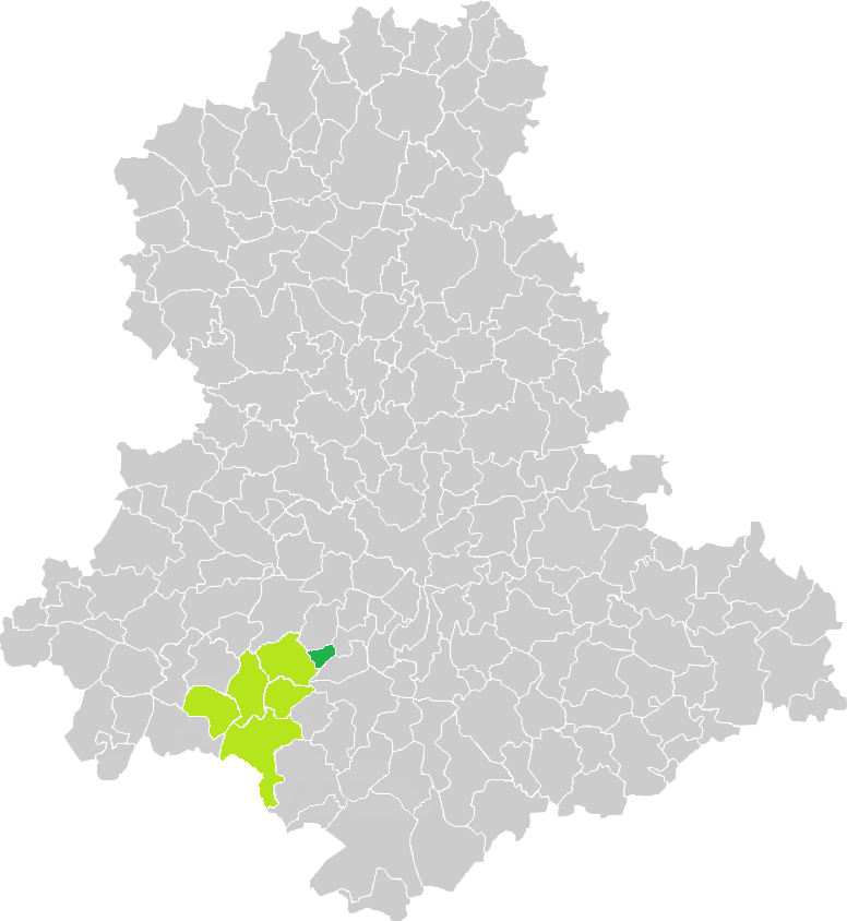 Carte de situation de la commune de Lavignac (en vert foncé) dans le votre Canton (en vert clair) sur une carte des communes de la Haute-Vienne